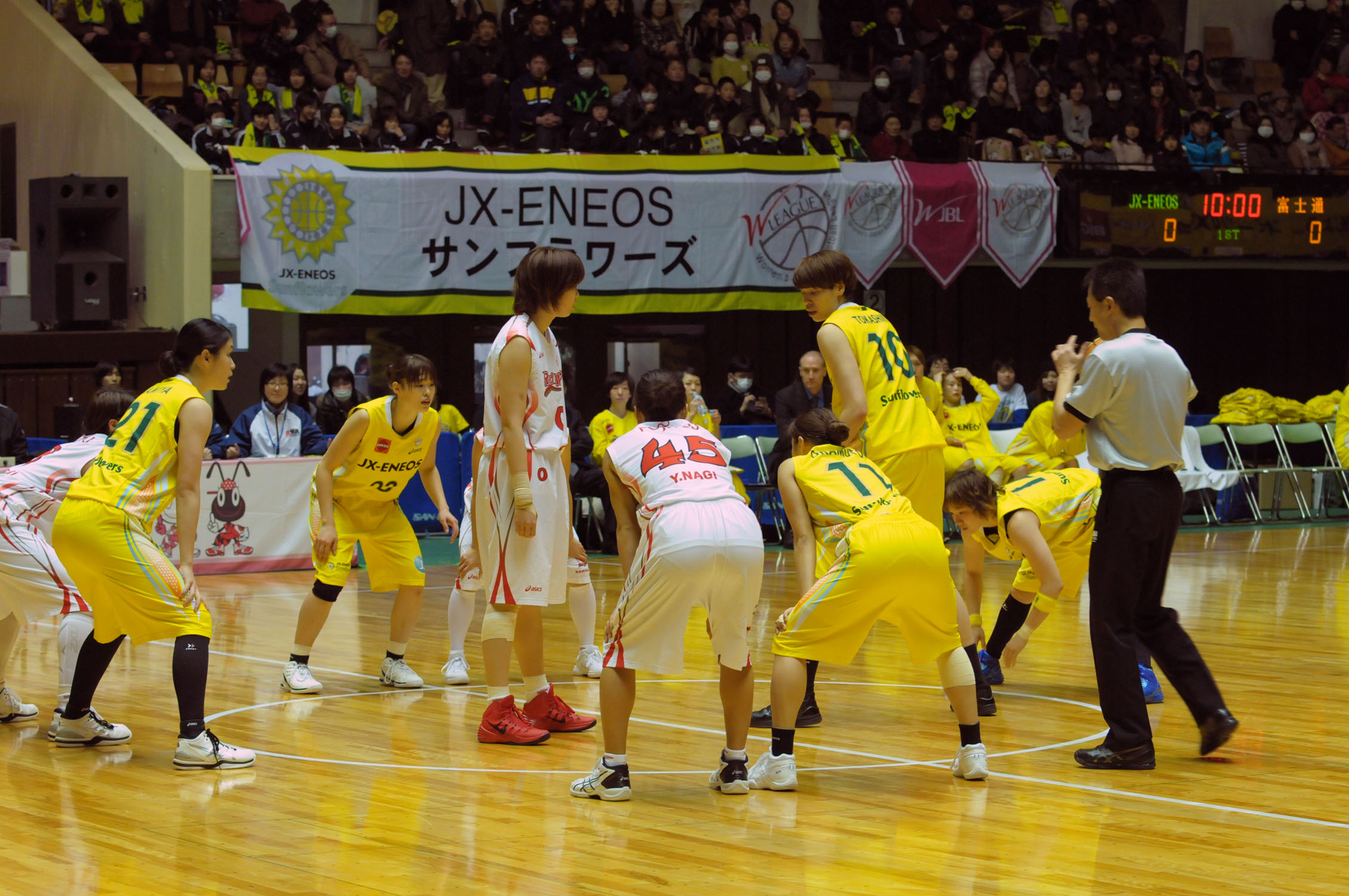 WJBL 13-14レギュラーリーグ、富士通対JX-ENEOS。秋田県立体育館。